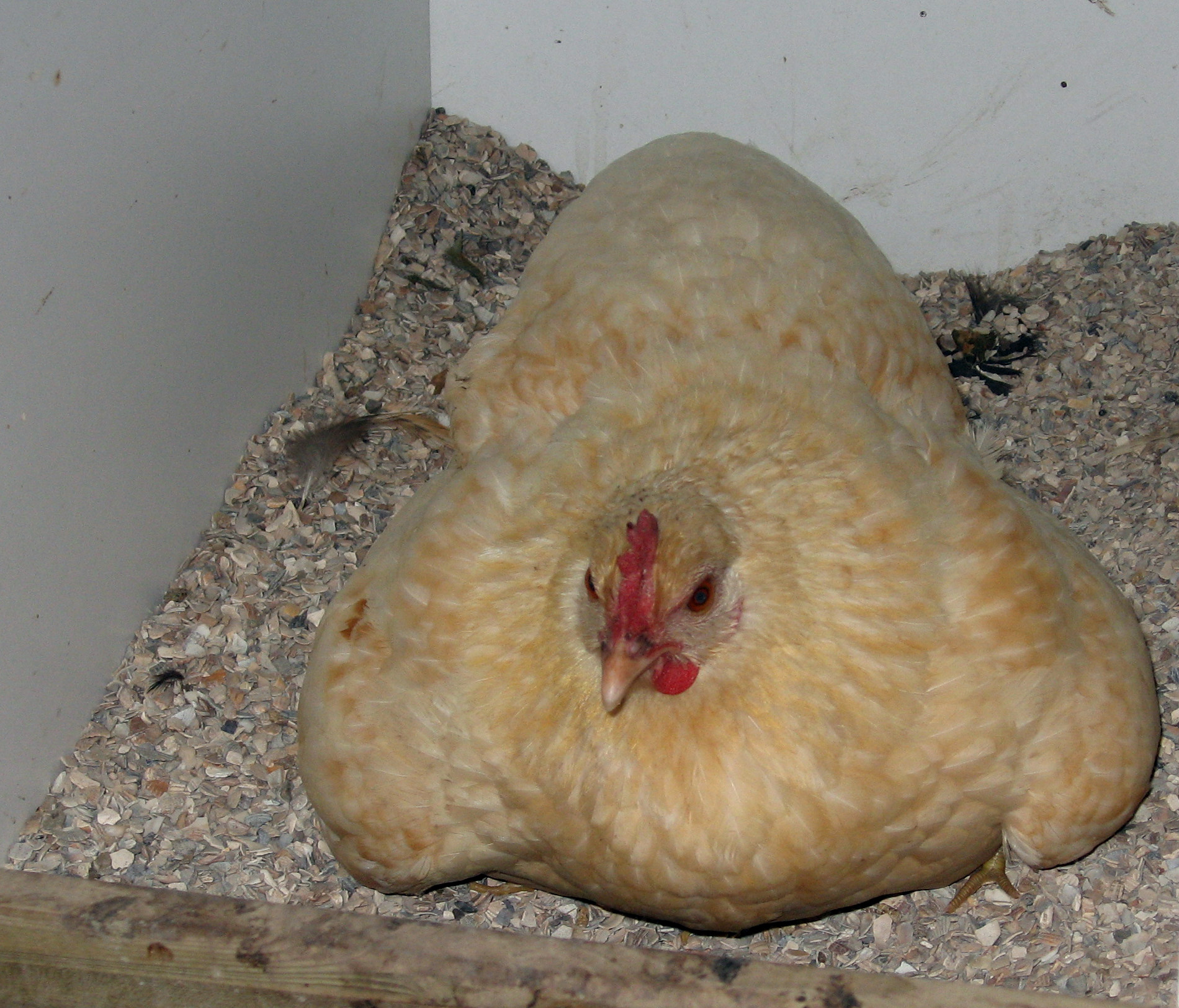 een vane boredse kipen, voor artikel hen (kip)